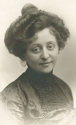 Hilda Fredriksen, portrett, kvinne, skuespillerinne, brystbilde.